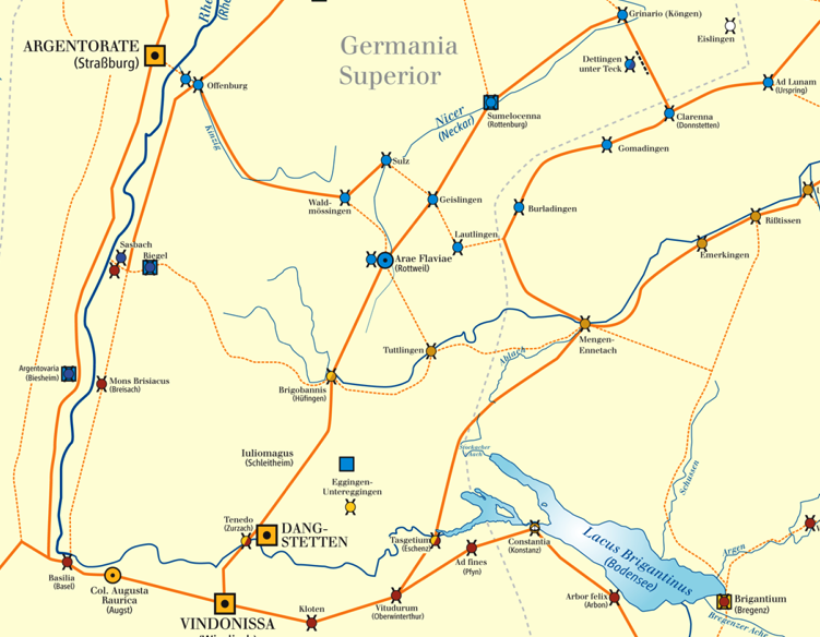 Ausschnitt aus der Karte des Obergermanisch-Raetischen Limes (File:Limes2.png, vom 18. Dezember 2008). Region Hochrhein–Obere Donau-Neckar.